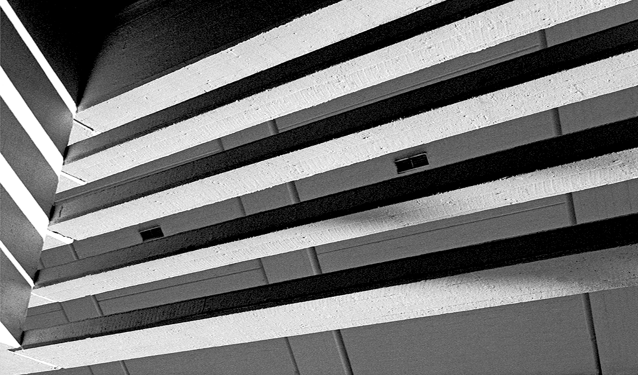 Illusion #1. Vrids denna bild 180 grader medsol syns det tydligt att det är en rad betongbalkar (solskydd).